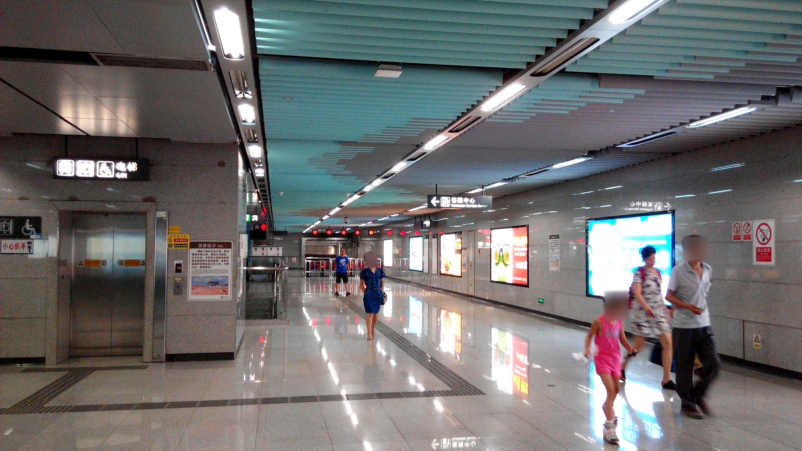 深圳地铁1号线 鲤鱼门站 大堂